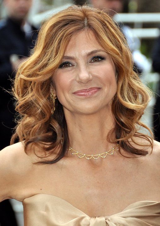 Florence Pernel au festival de Cannes